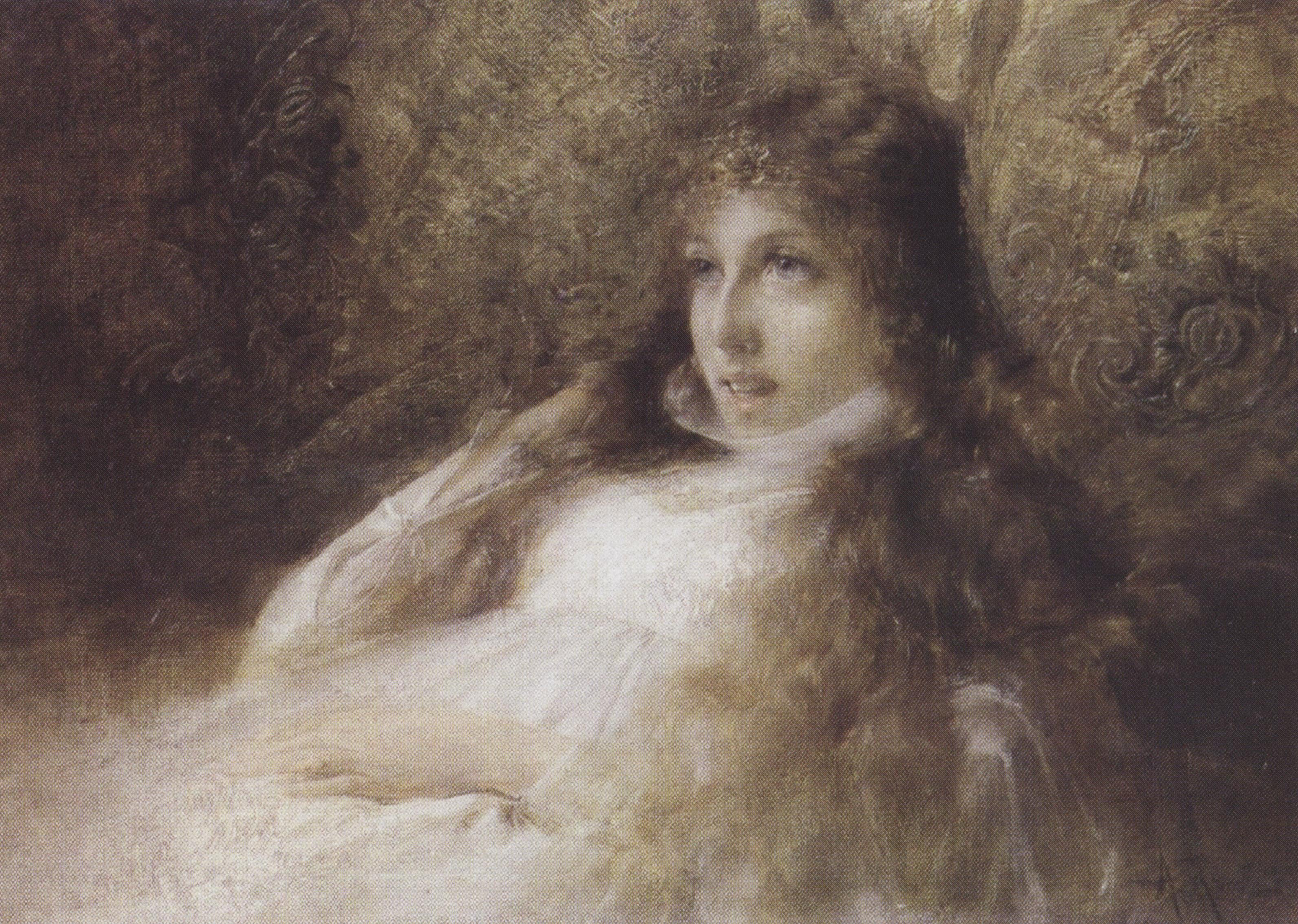 Realizzato per illustrare L'Isaotta Guttadauro di Gabriele D'Annunzio